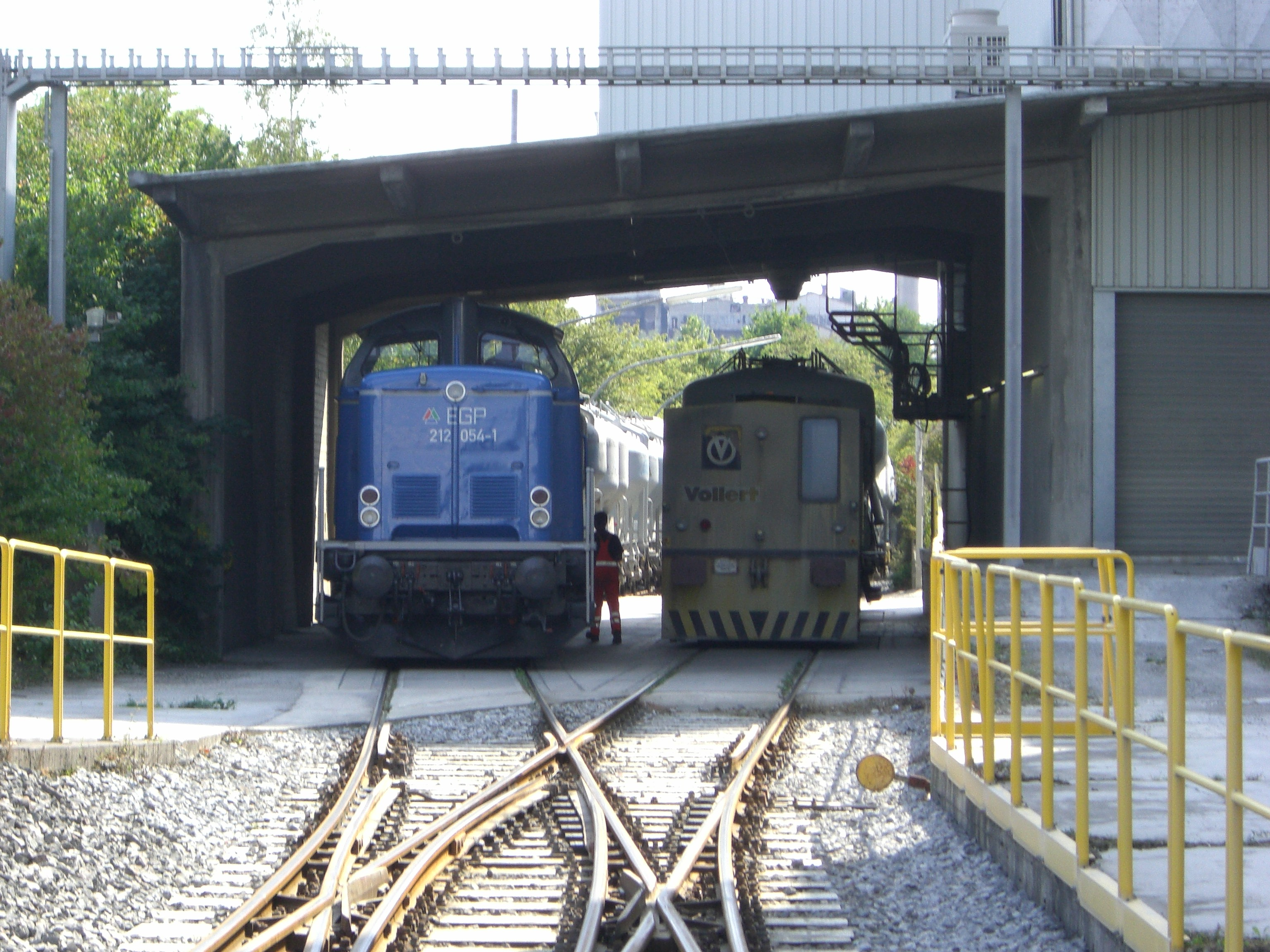 Verschubarbeiten Werk Dyckerhoff (ehem.Fortuna)